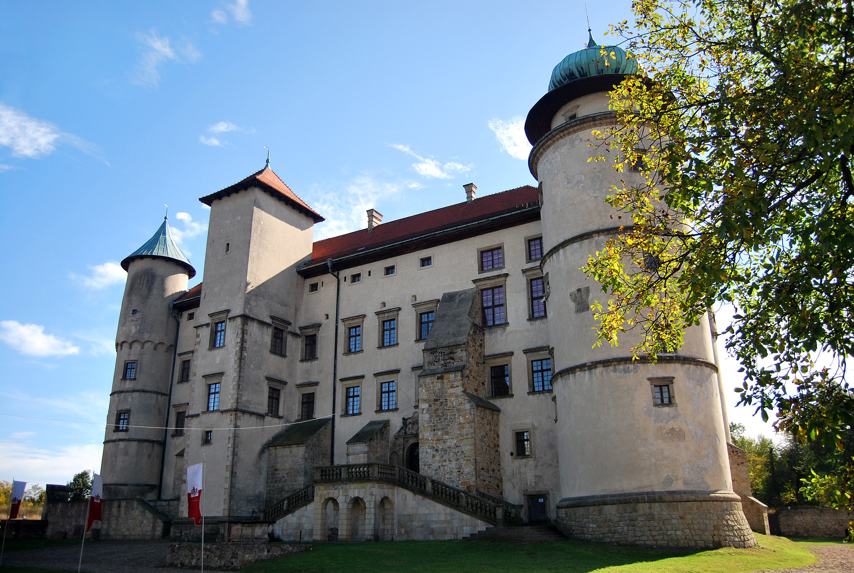 Nowy Wiśnicz, zespół zamkowy, XVI, po 1620